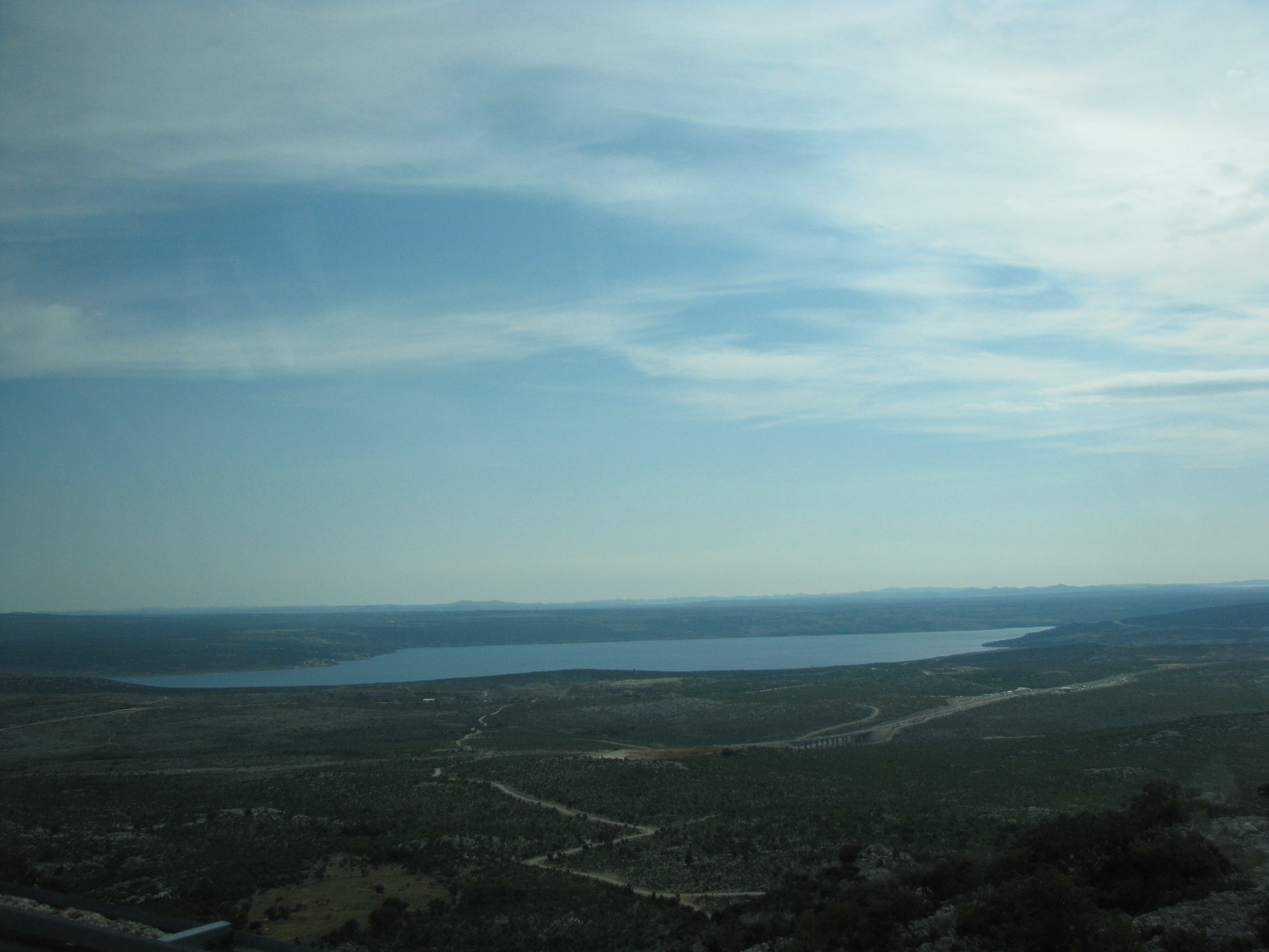 Novigradsko more